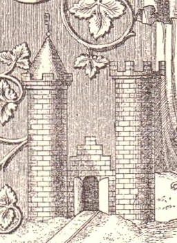 Burg Schladen 1363; stilisierte Darstellung auf der Grabplatte des Hildesheimer Bischofs Heinrich III.